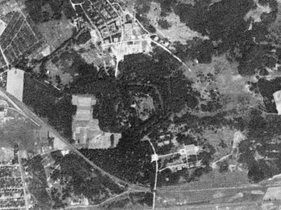 Fort IIIa Twierdzy Poznań sfotografowany przez satelitę KH-4A 1023, 23 sierpnia 1965 r.